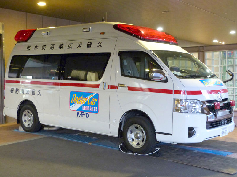 久留米消防署のドクターカー （内部の装備は高規格車と同じ）